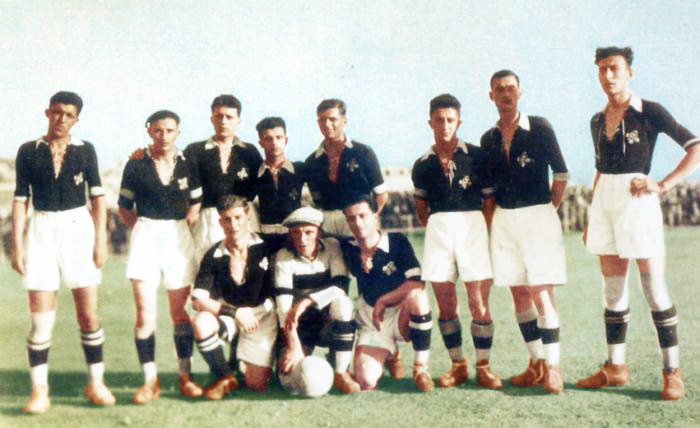 Η ομάδα του ΠΑΟΚ το 1926, χρωματική επεξεργασία από το χρήστη Sportingn